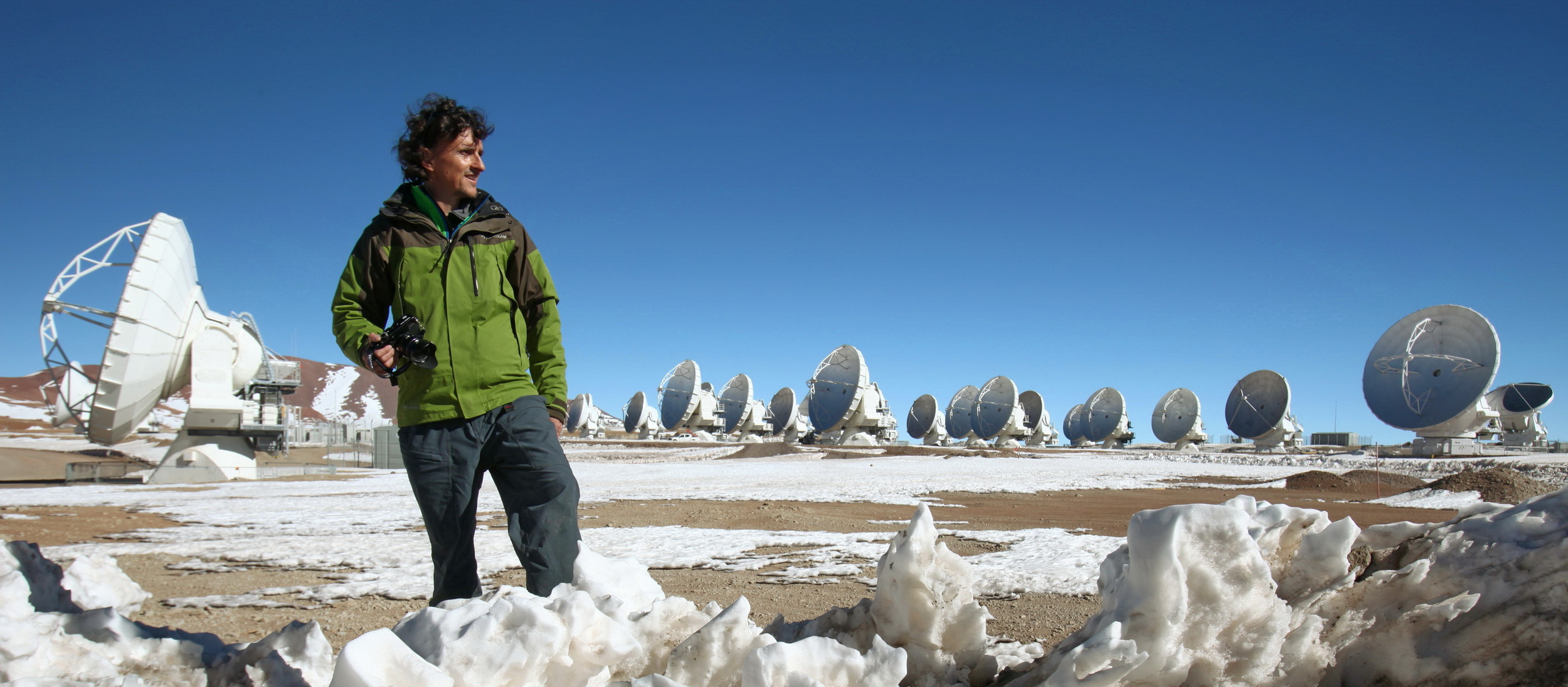 Foto di Luca Bracali